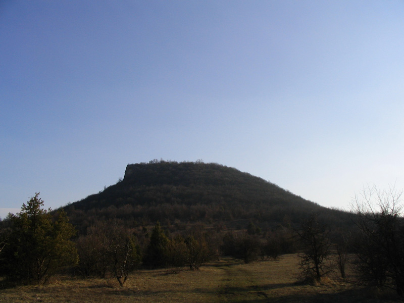 Тепе-Кермен. Общий вид с севера